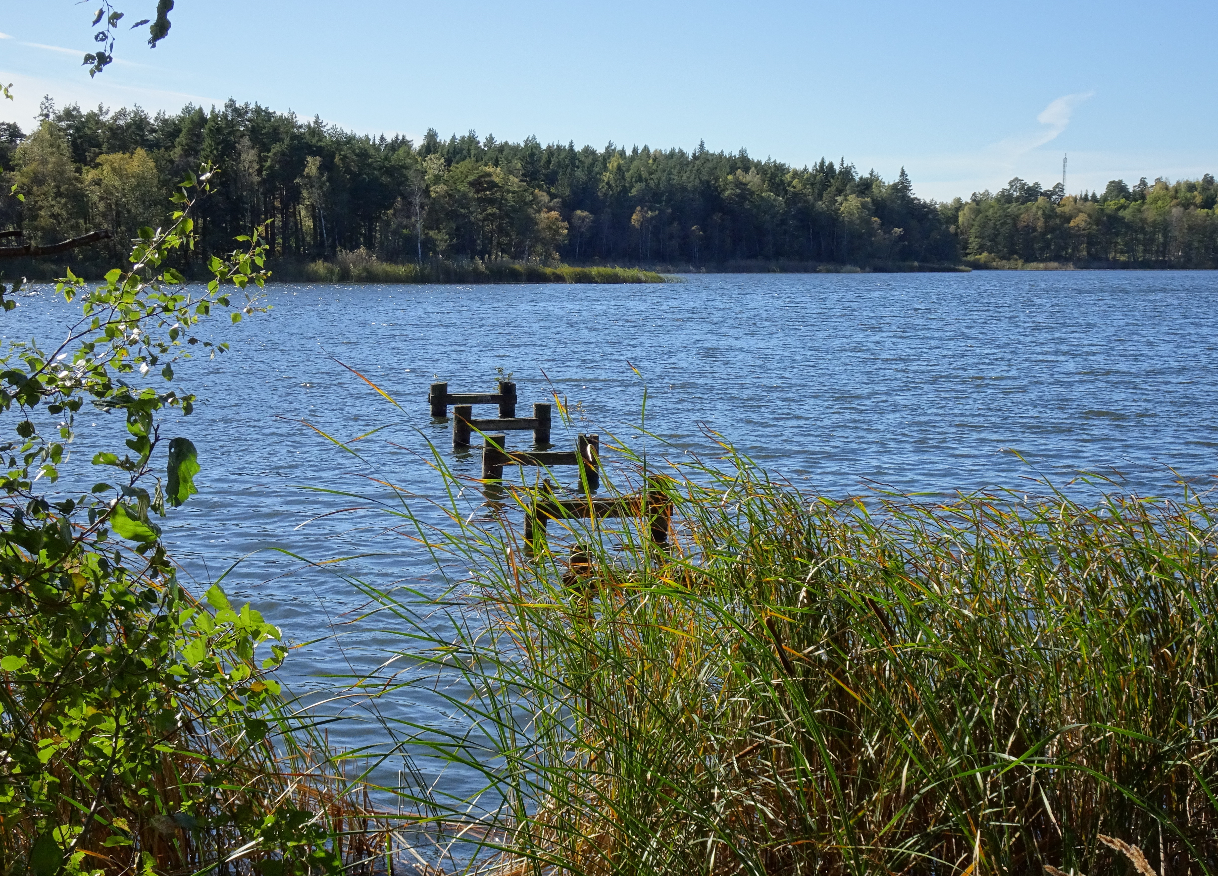 Översjön, vy mot norr